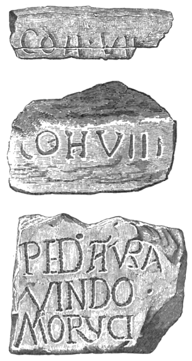 Römische Bauinschriften vom Hadrianswall (Slab-Stones), gefunden in oder um Drumburgh, 18. und 19. Jahrhundert.